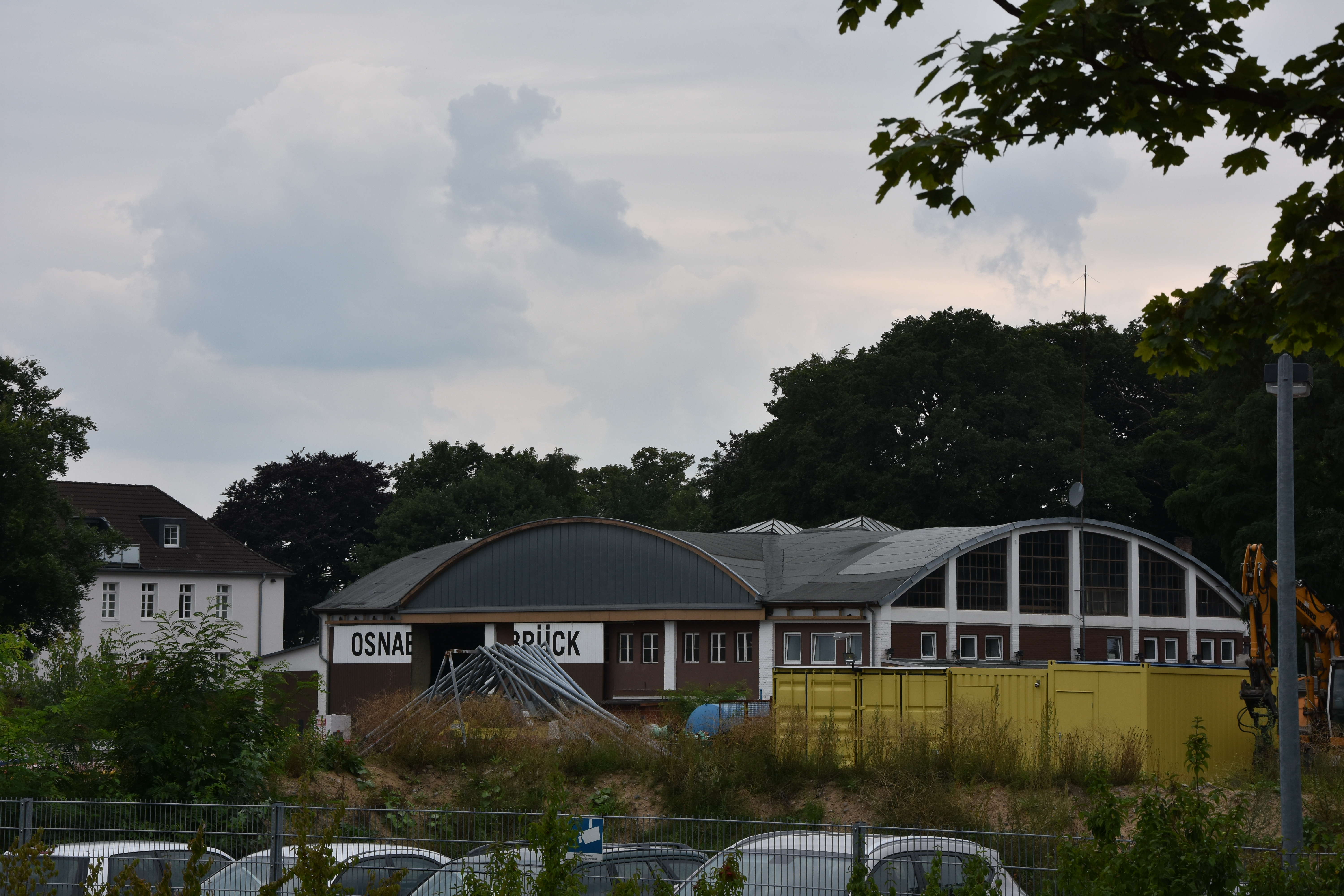 Alter Flugzeughangar Osnabrück Hafen